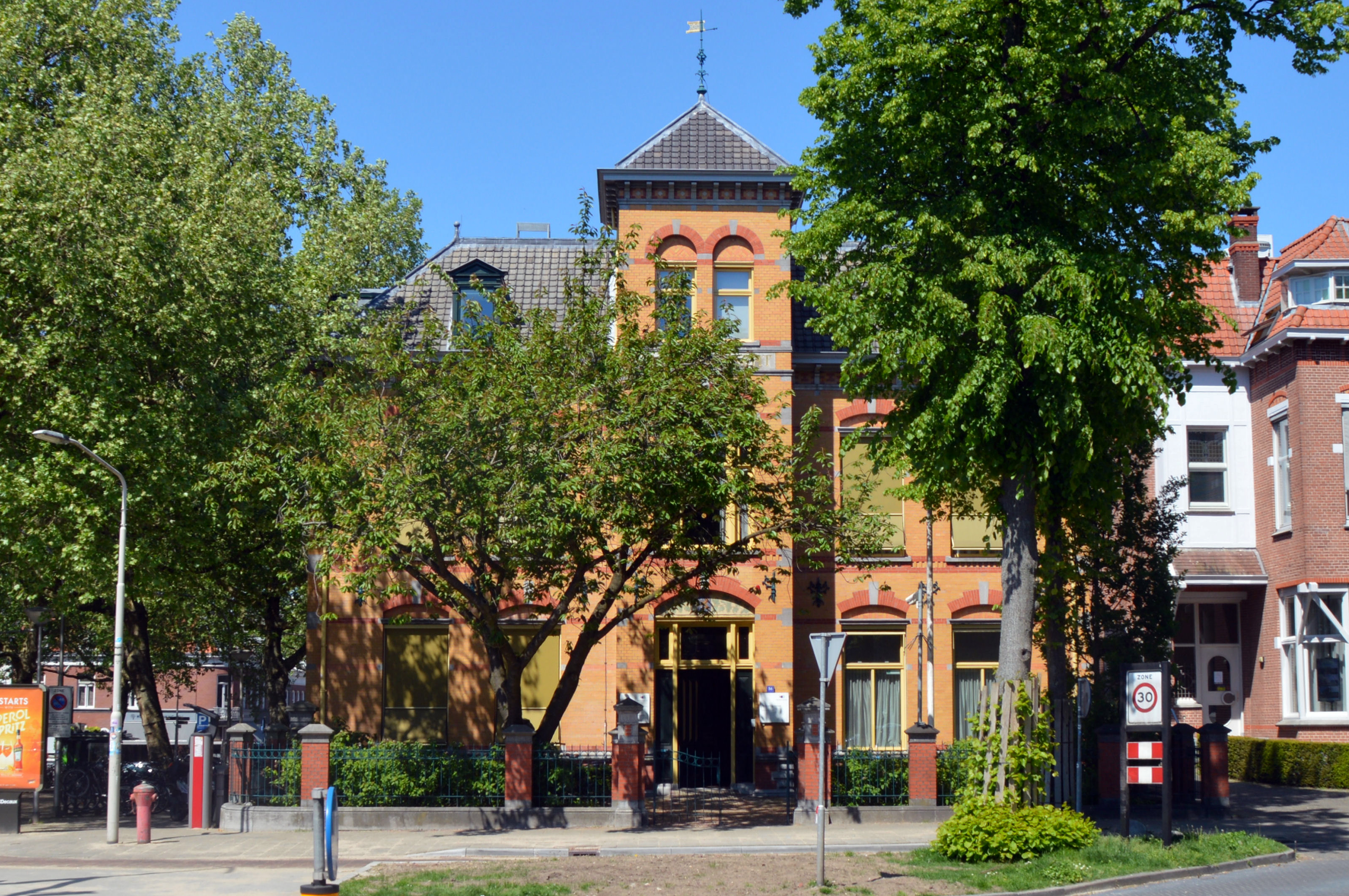 Kantongerecht Oranjesingel 56 Nijmegen Willem Metzelaar 1906